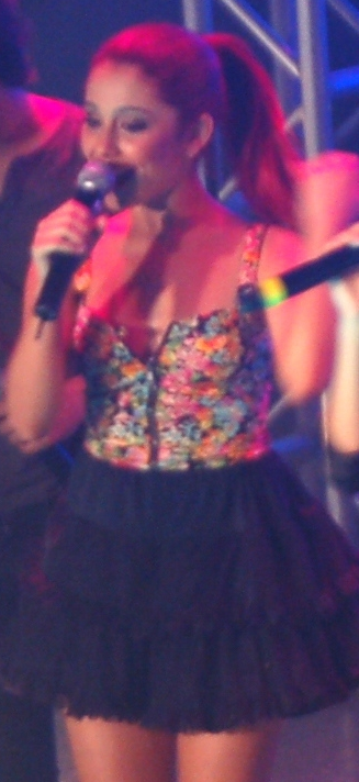 Ariana Grande si esibisce all'Avalon Hollywood in un evento insieme al resto del cast il 16 maggio 2011.